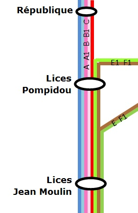 lignes de bus albibus sur trois station. Schéma fait par Force Ouvrière